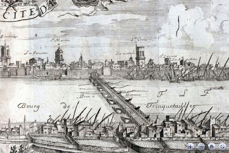 Vue d’Arles en 1660 (détail). Pont sur le Rhône entre Arles et Trinquetaille.